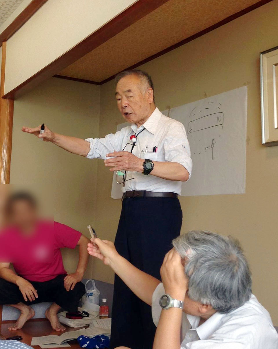 2013年7月29日−31日開催の「千葉県 仮説実験授業研究会千葉・勝浦大会ホテル勝浦三日月」の分科会で発言する板倉聖宣。